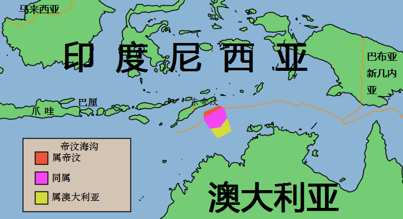 这是由File:Timor Gap map.PNG汉化而成，为帝汶海沟划界示意图。